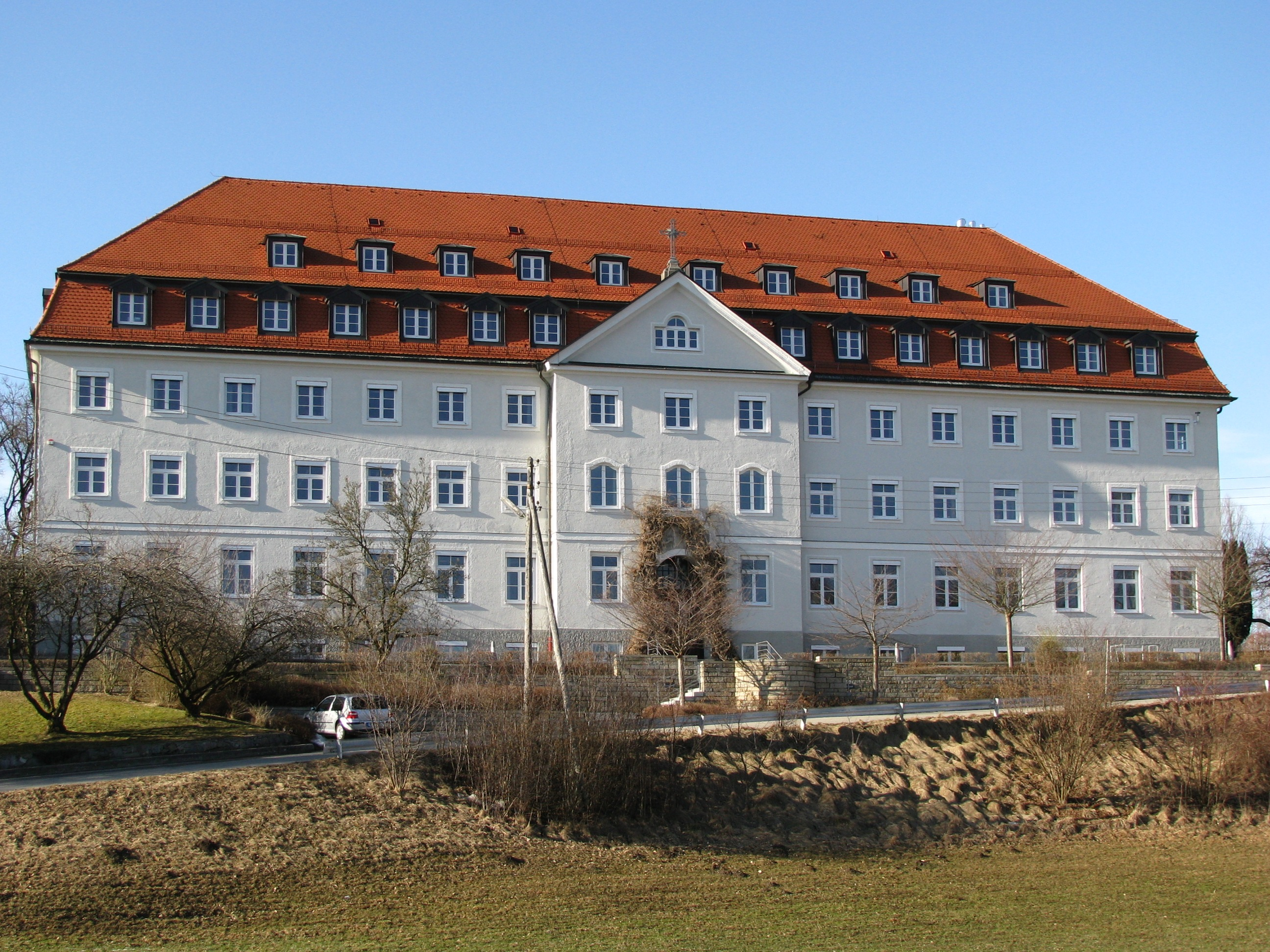 Ehem. Institut der Englischen Fräulein, heute Maria-Ward-Realschule, viergeschossiger neubarocker Monumentalbau mit Mansardwalmdach und übergiebeltem Mittelrisalit, nach Plänen von Schwarzenbeck, 1928; nordseitig angebaute Hauskapelle, Saalbau mit eingezogenem Chor und gerundeter Apsis, 18.-20. Jh.; mit Ausstattung; Lourdesgrotte aus Tuffsteinen im Garten, um 1928.